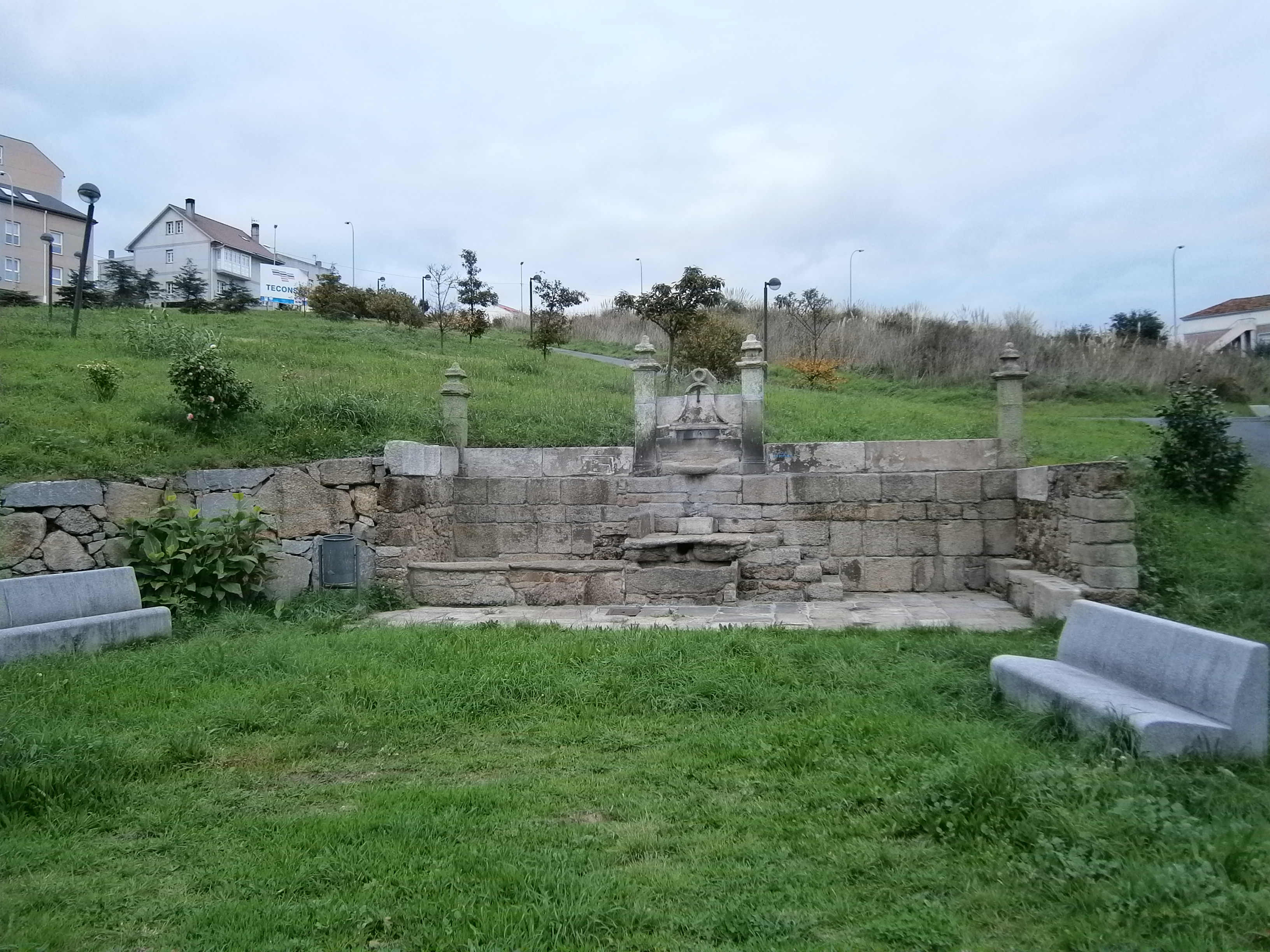 Fonte en Cances, A Coruña